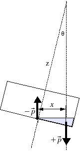 free surface scheme - Schéma Carène liquide